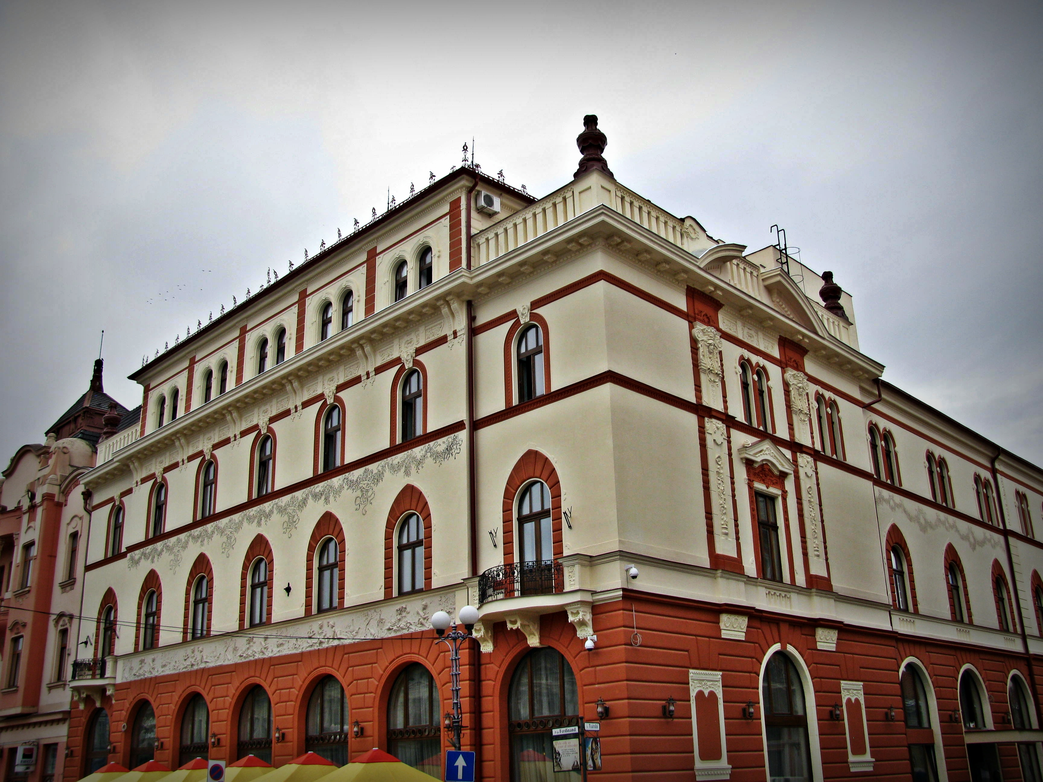 Fostul Hotel şi restaurant Pannonia; ulterior Hotel "Transilvania”